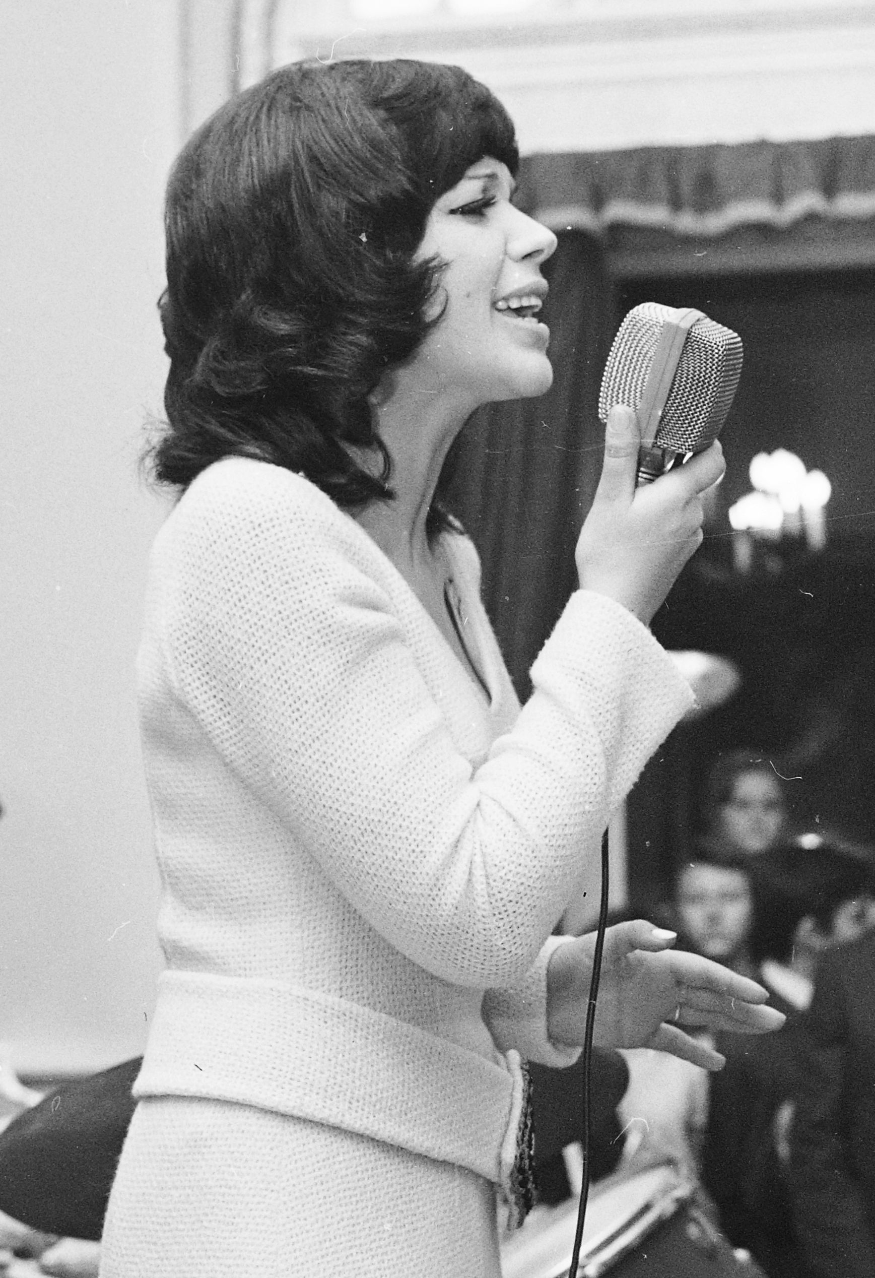 Harangozó Teri a Postás Művelődési Központ színpadán (Budapest VI.)